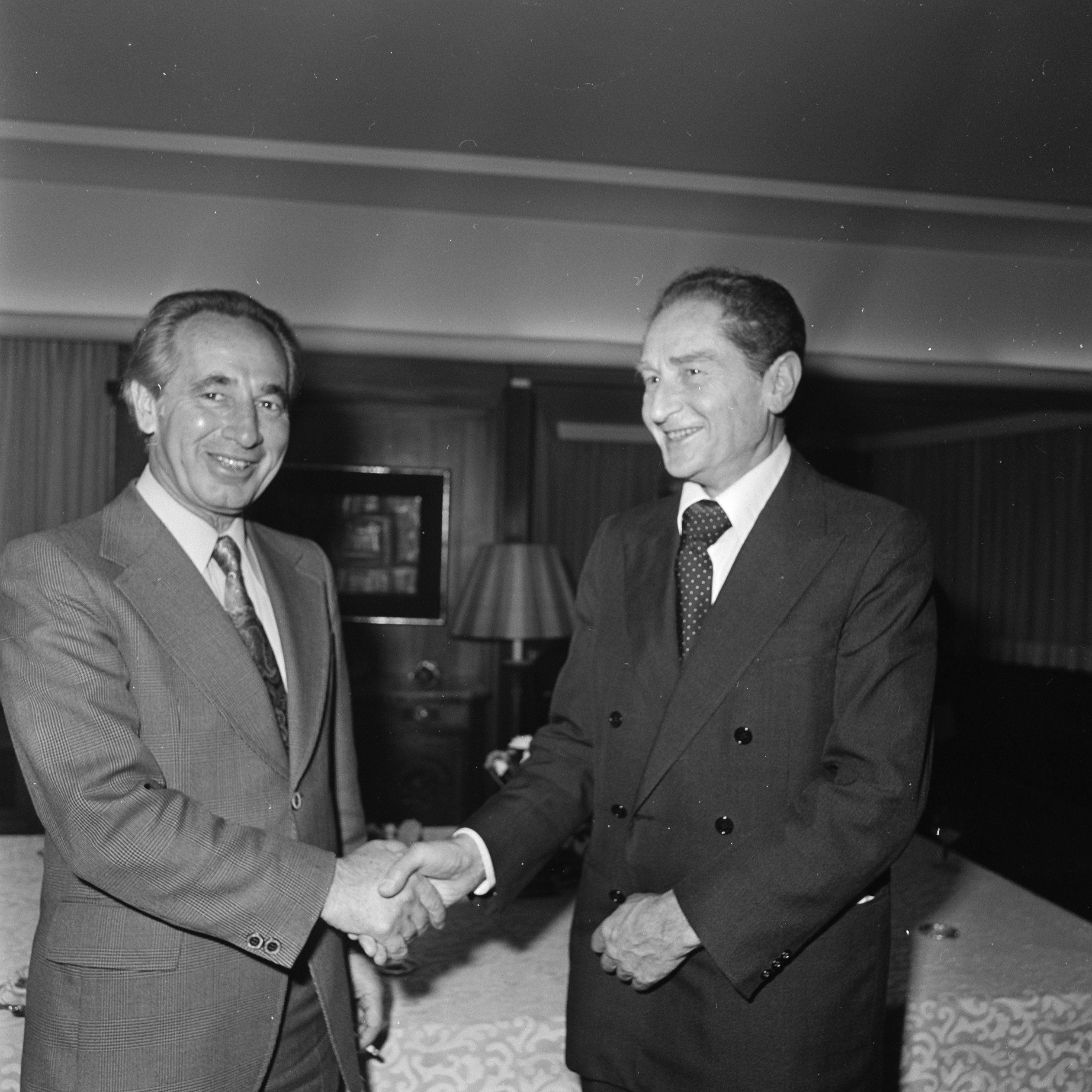 Israelische minister van Defensie Peres op bezoek bij ambassadeur A. Kidron ; Peres (links) en A. Kidron.